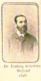 Scan eines Porträts aus dem Scheiblerschen Familienbesitz